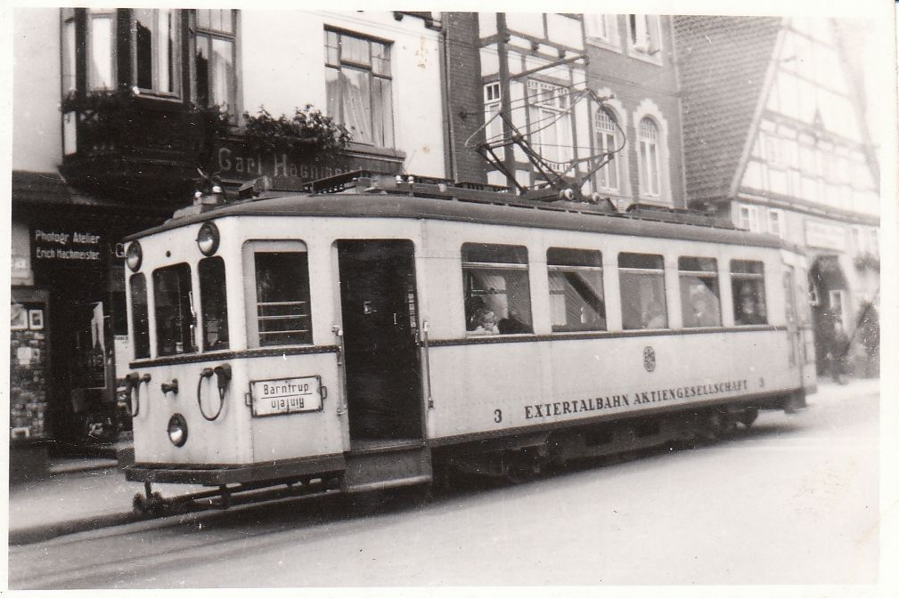 Triebwagen 3 der Extertalbahn in Rinteln, Aufnahme von 1939